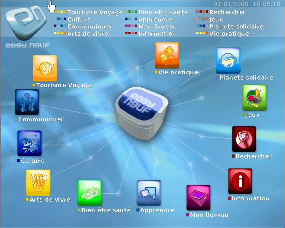 Screenshot de l'interface Ergo de l'easyOS